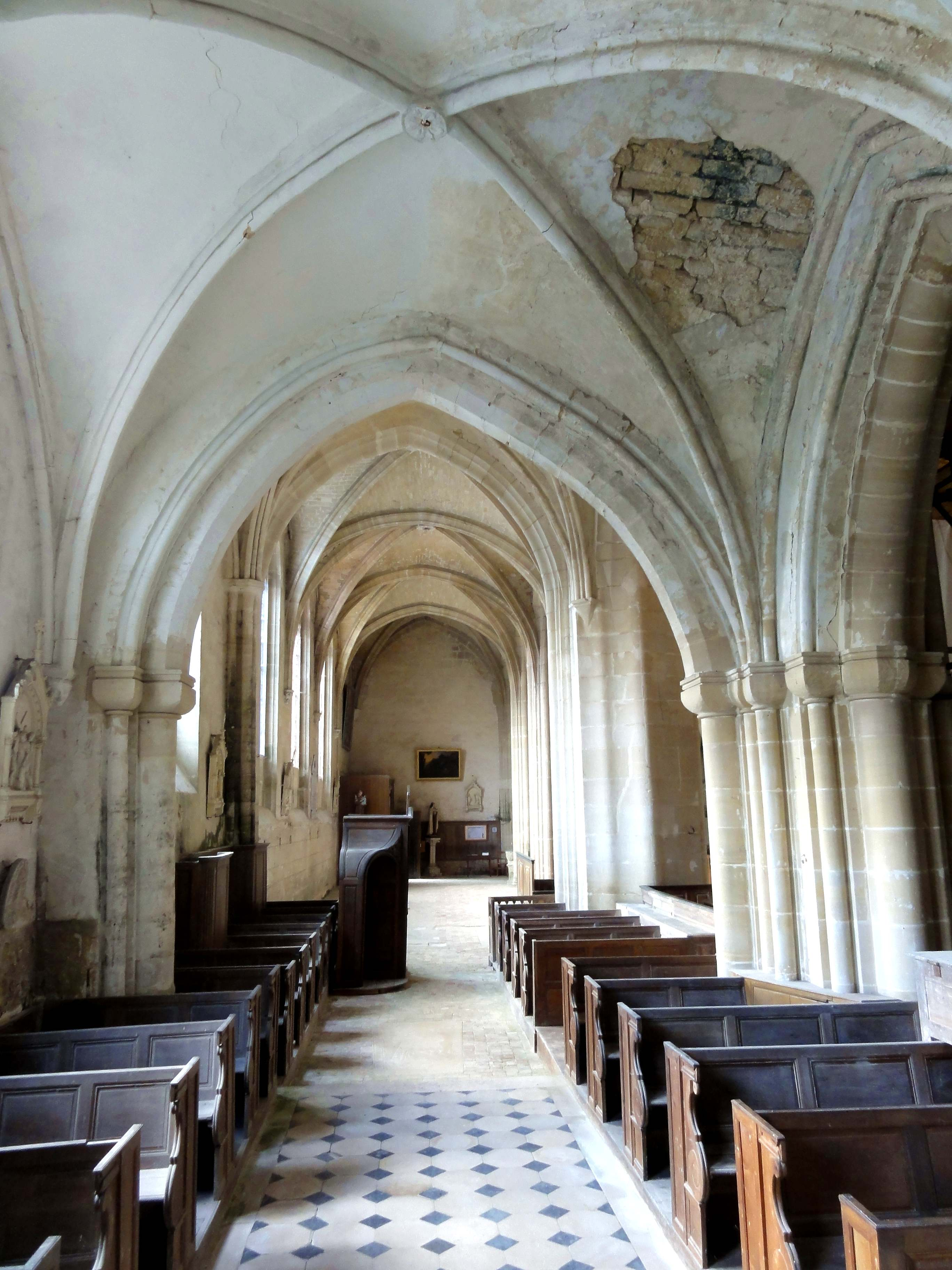 Intérieur de l'église - voir le titre du fichier.